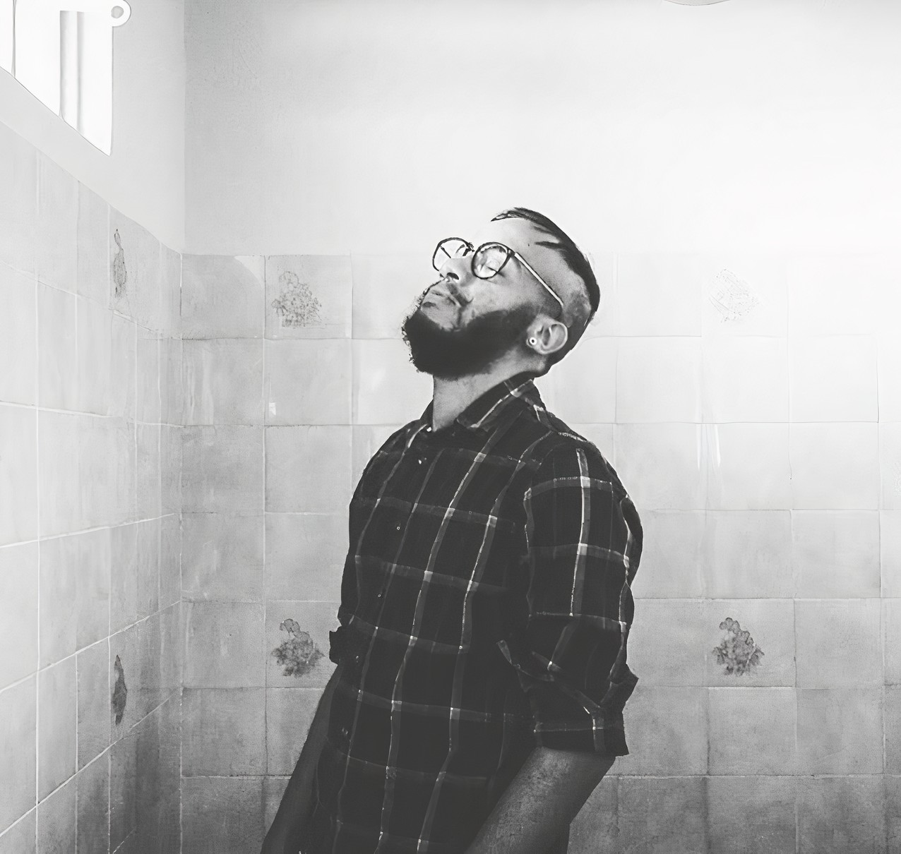 Gabriel Martins diretor, produtor e podcaster.